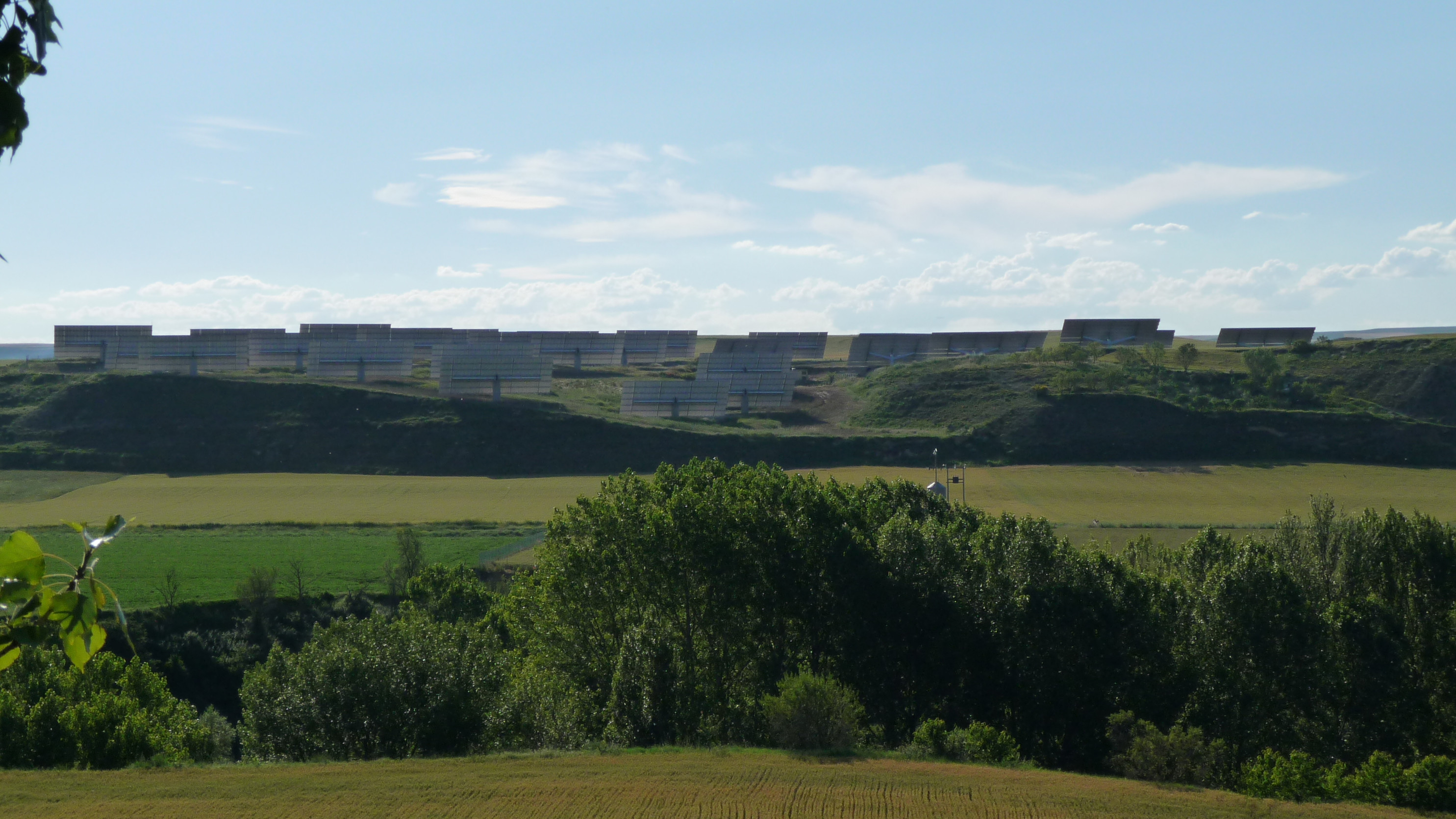 Fanega solar. Planta de energía solar de Ochánduri. La Rioja (España)